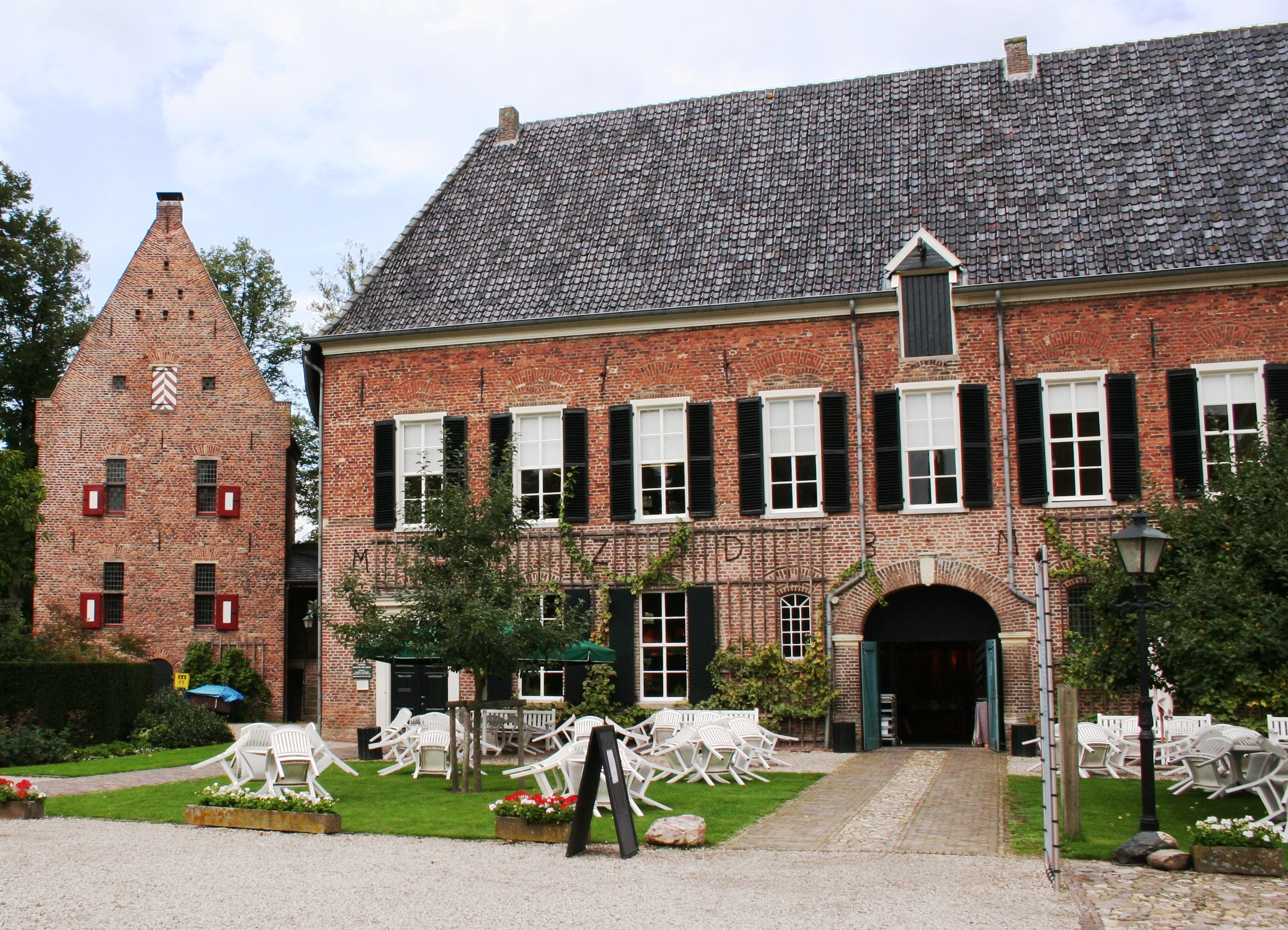 Restaurant bij Huis Bergh, Montferland.